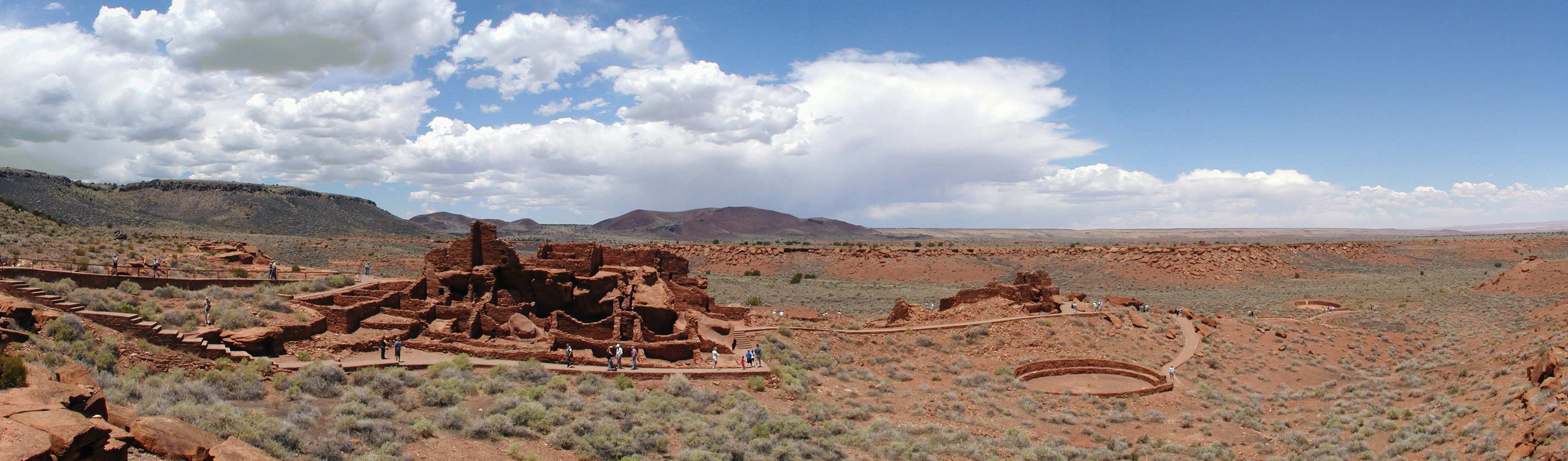 Wupatki Ruin (panorama): Wupatki National Monument, Arizona